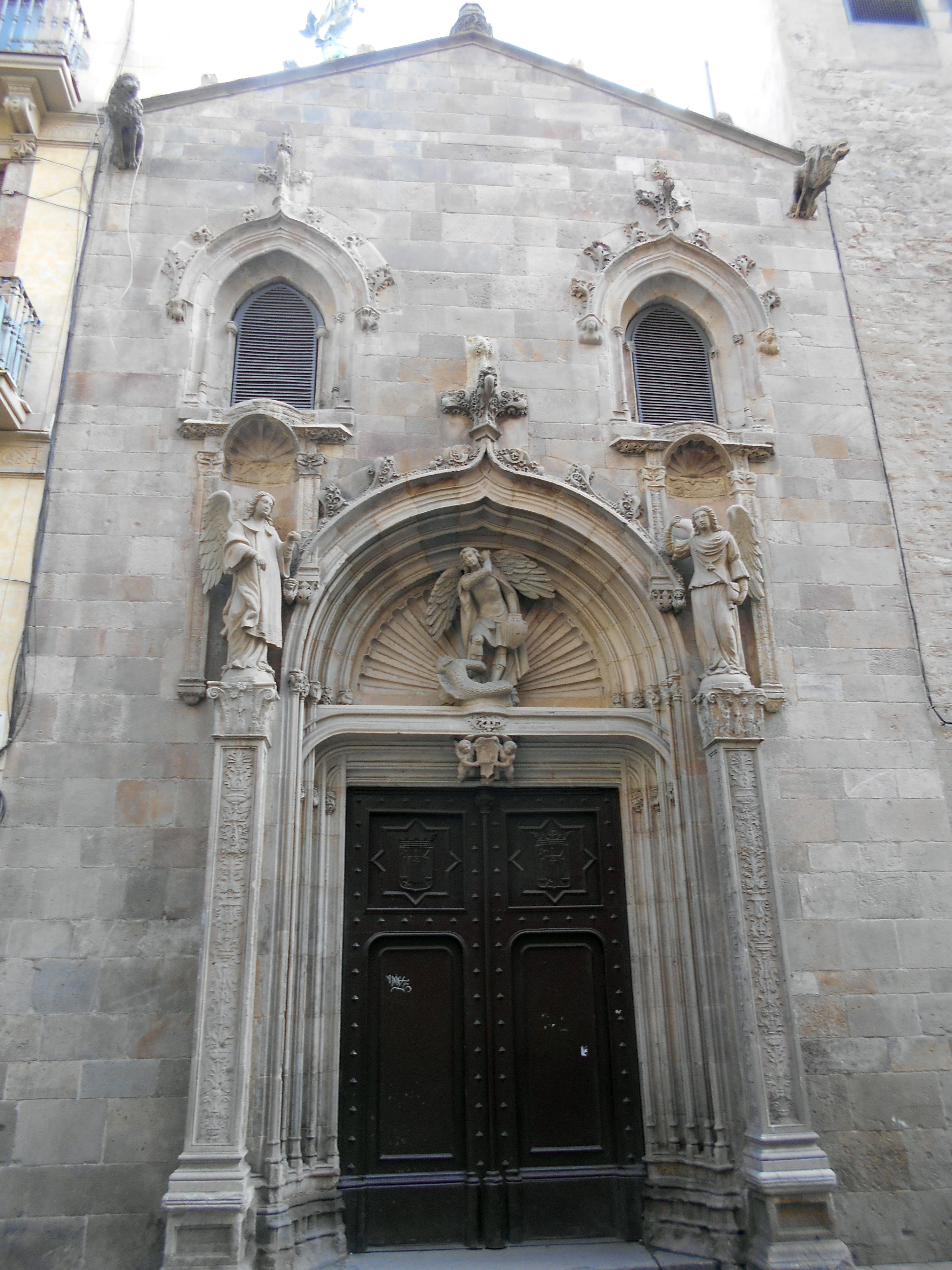 Portal de Sant Miquel (Basílica de la Mercè).